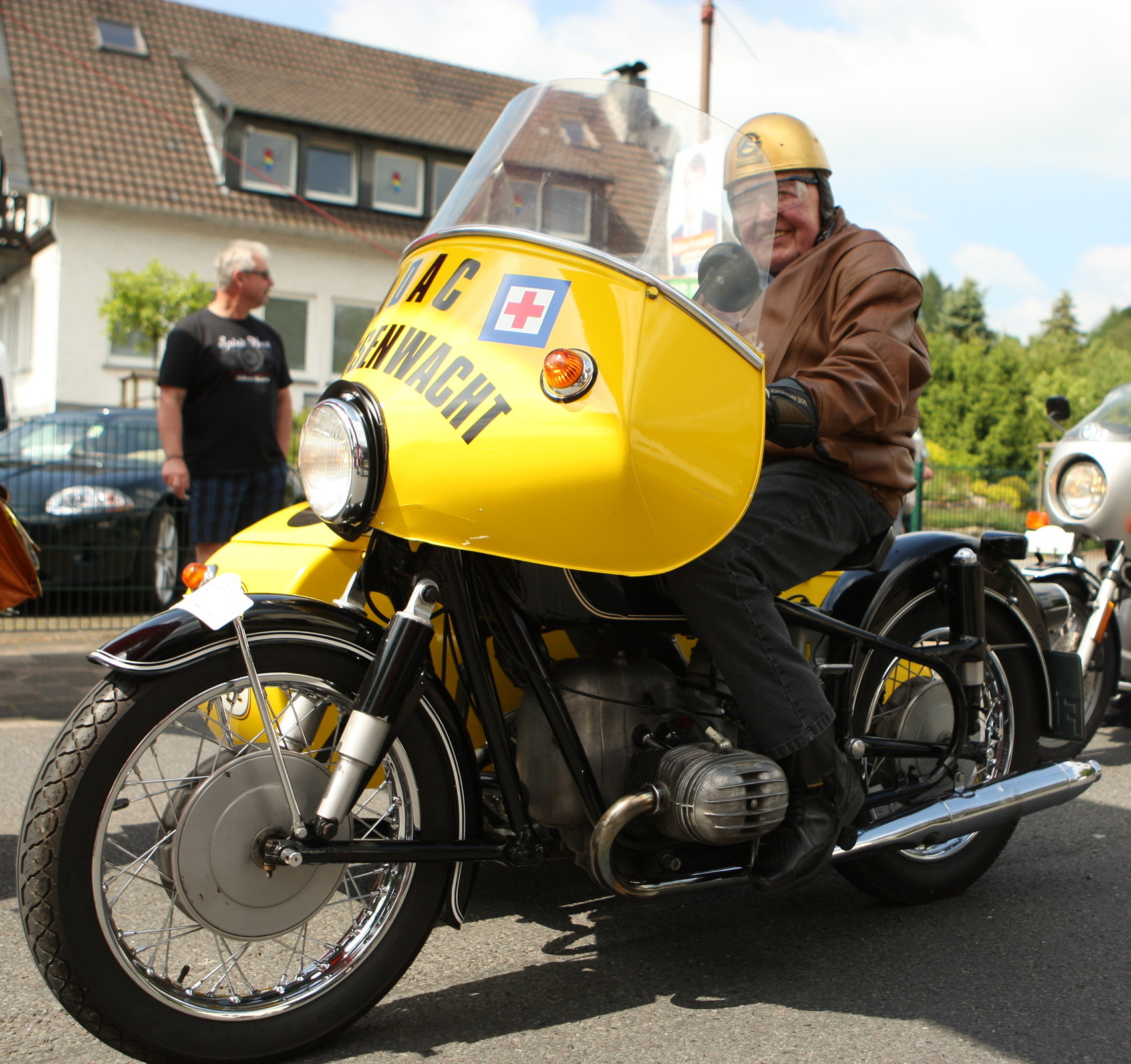 Otto Flimm während der Christophorus-Fahrt Ruppichteroth-Schönenberg 2014